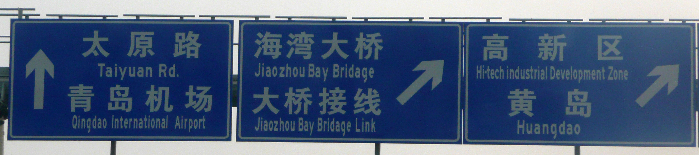 Ausschilderung und Bezeichnungen der Jiaozhoubucht-Brücke (mit Schreibfehlern auf dem mittleren Schild: Bridage anstatt Bridge)